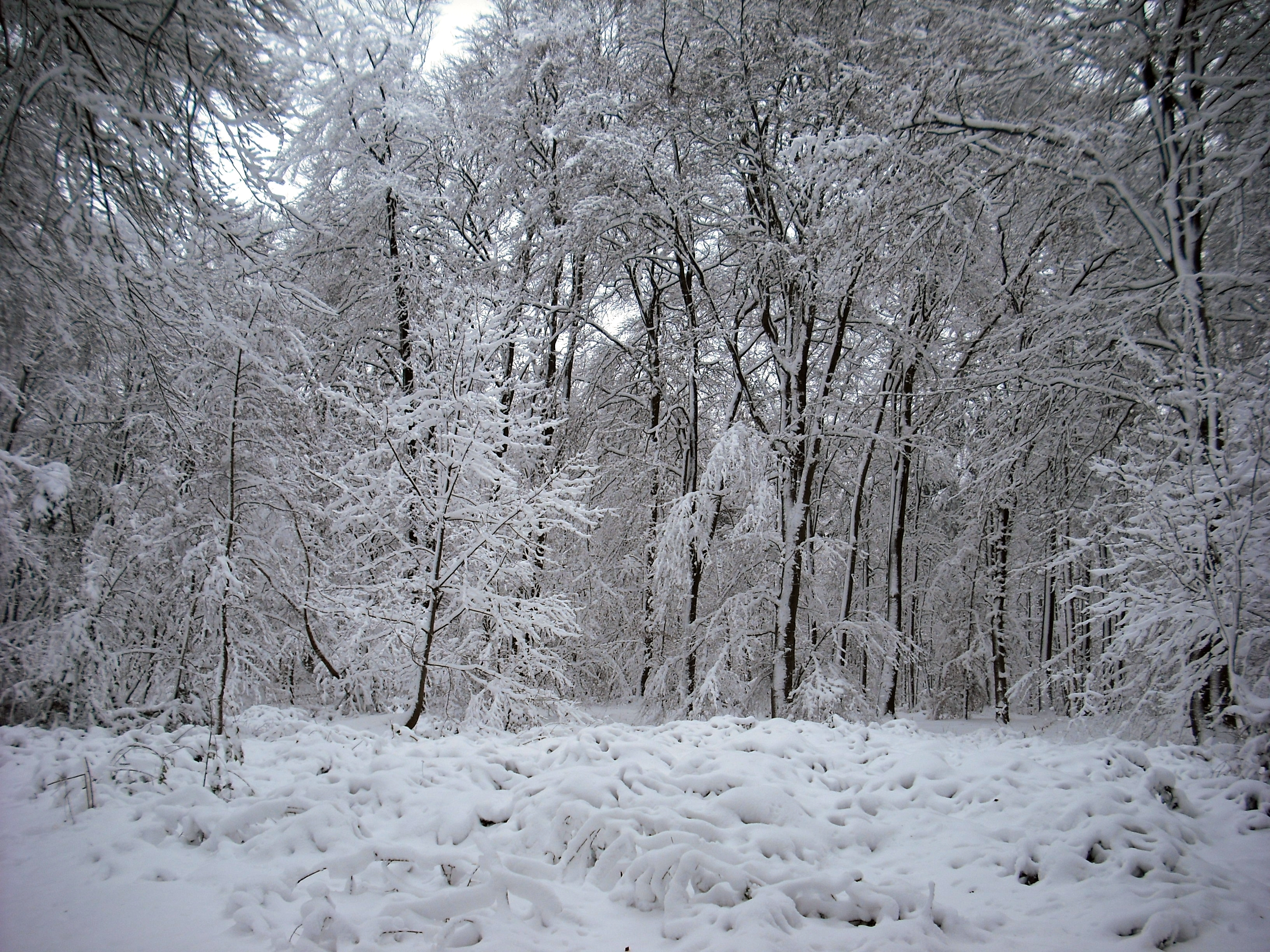 Reichswald, Bereich im Landschaftsschutzgebiet „Waldgebiet des Tiergartenwaldes“ in Kleve, Deutschland